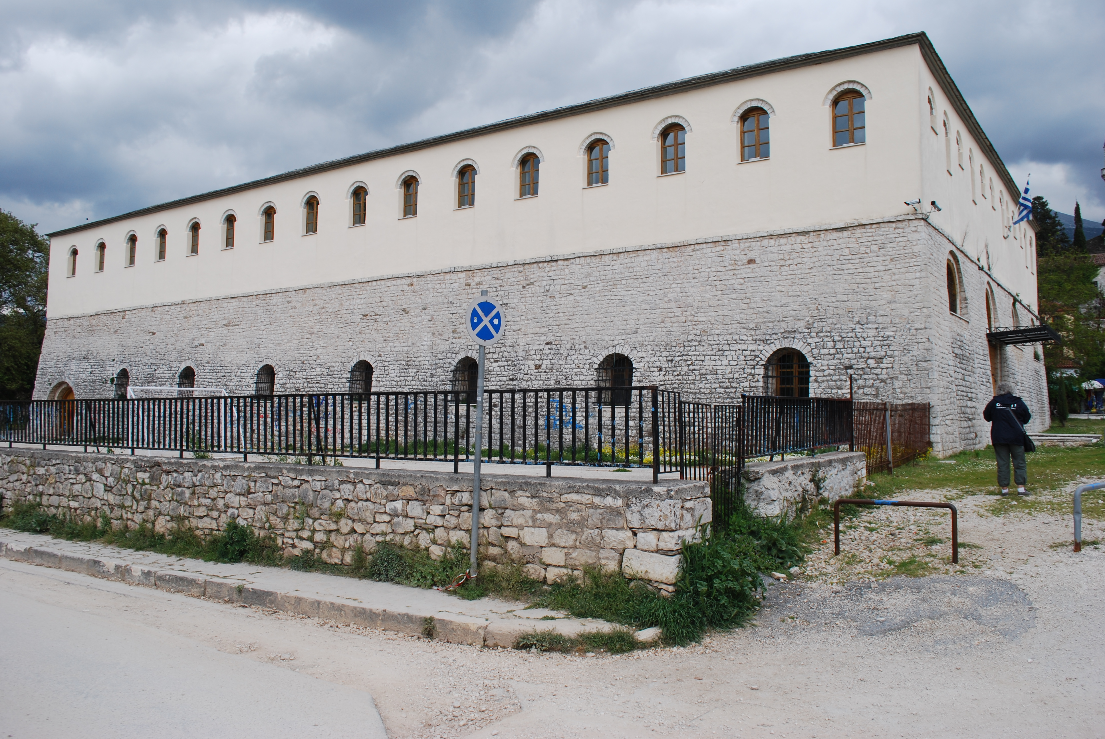 Soufari Sarai, Ioannina.